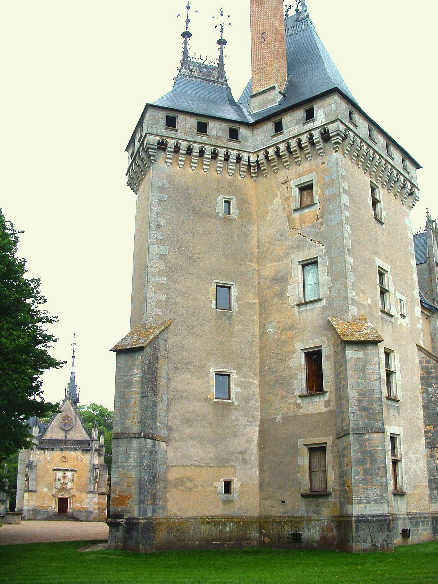 Château de Meillant - Tour des Sarrasins ou de Louis XII, étayée par des contreforts avec des mâchicoulis refaits par Lenormand au XIXe siècle